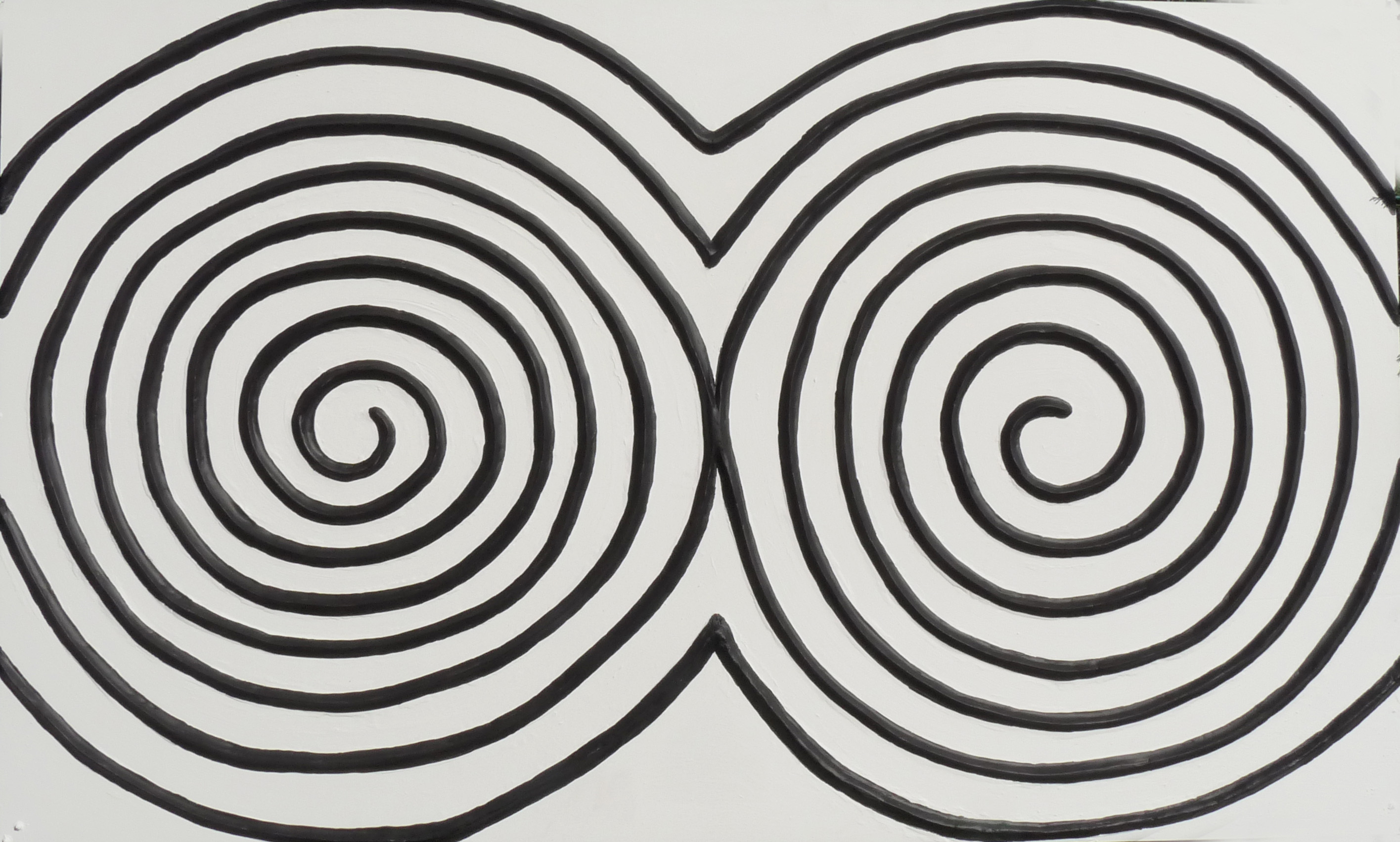 Motifs géométriques traditionnels de l'art Imigongo, né à la fin du 18e s. dans la province de Kibungo (Rwanda). Panneaux installés à Saint-Dié-des-Vosges dans le cadre du 22e Festival international de géographie où le Rwanda était le pays invité.